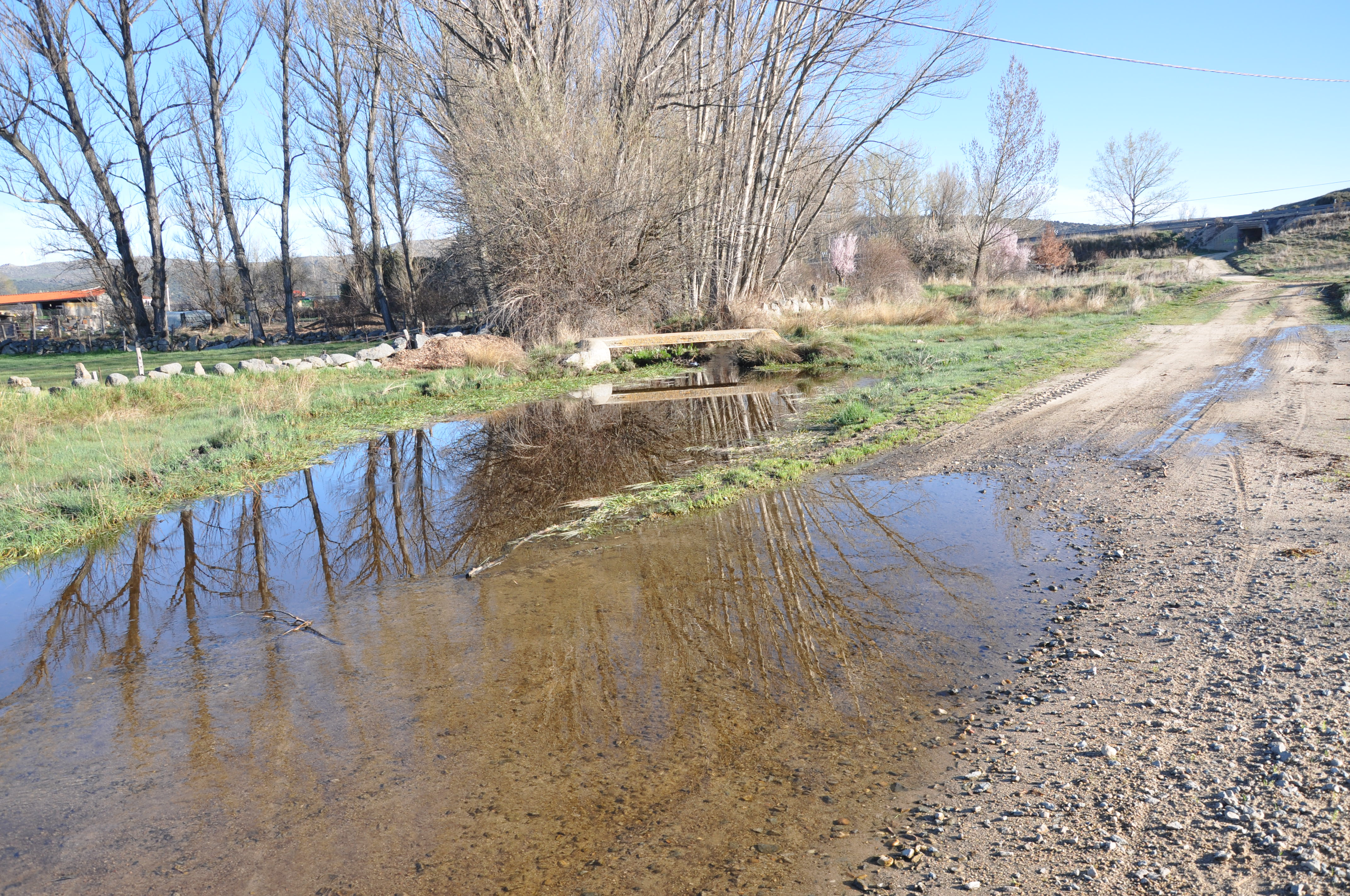 Río Paradillo, La Torre, Ávila, España.